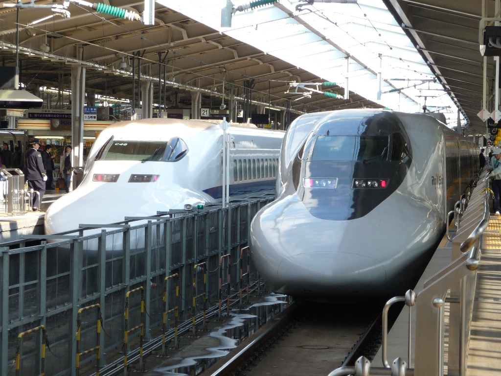 新大阪駅にて700系新幹線の並び。JR東海C編成（試運転列車）とJR西日本E編成。